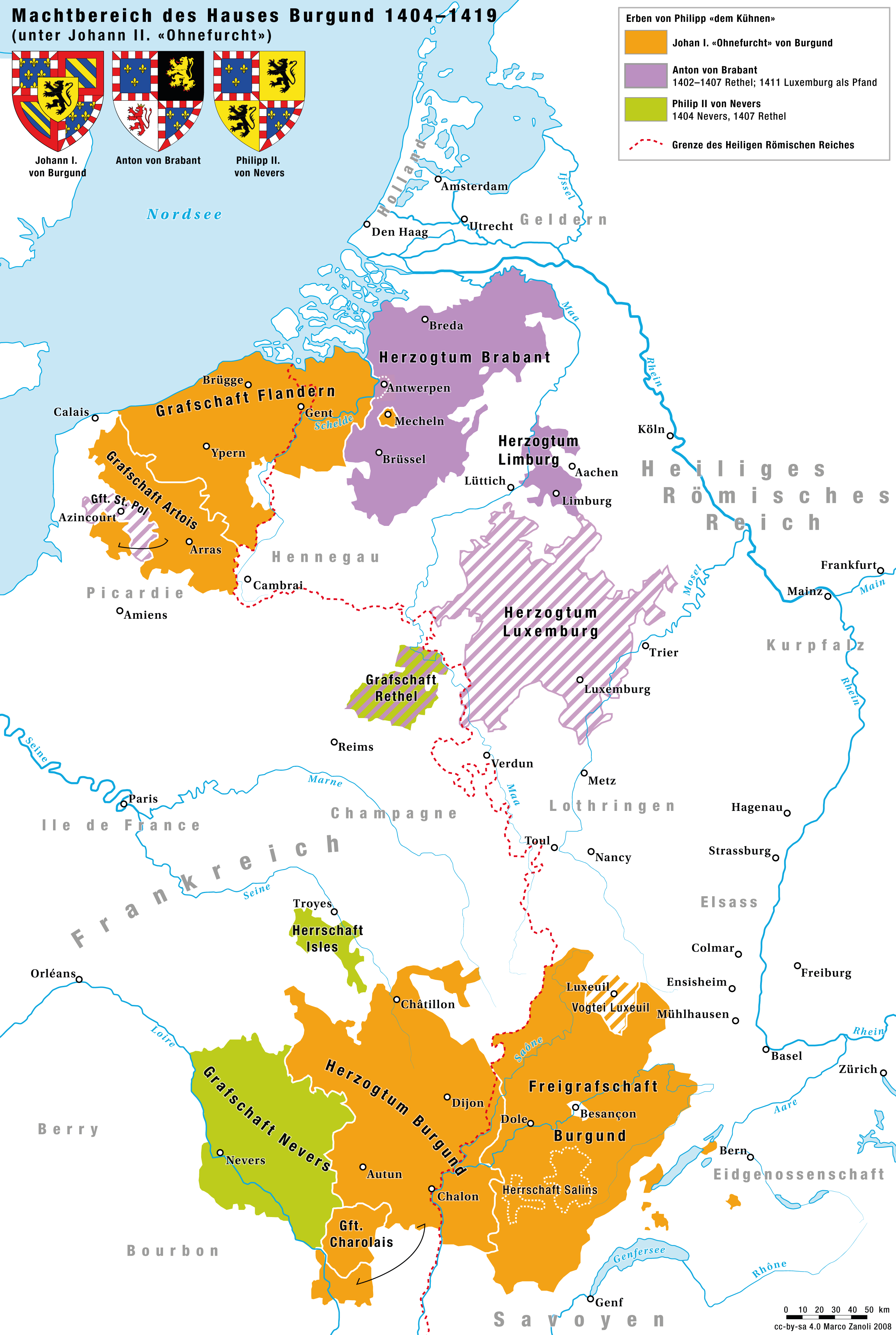 Das Herrschaftsgebiet des Hauses Burgund unter den Söhnen von Philipp dem Kühnen: Johann I. Ohnefurcht von Burgund-Flandern, Anton I. von Burgund-Brabant und Philipp II. von Burgund-Nevers zwischen 1363 und 1404